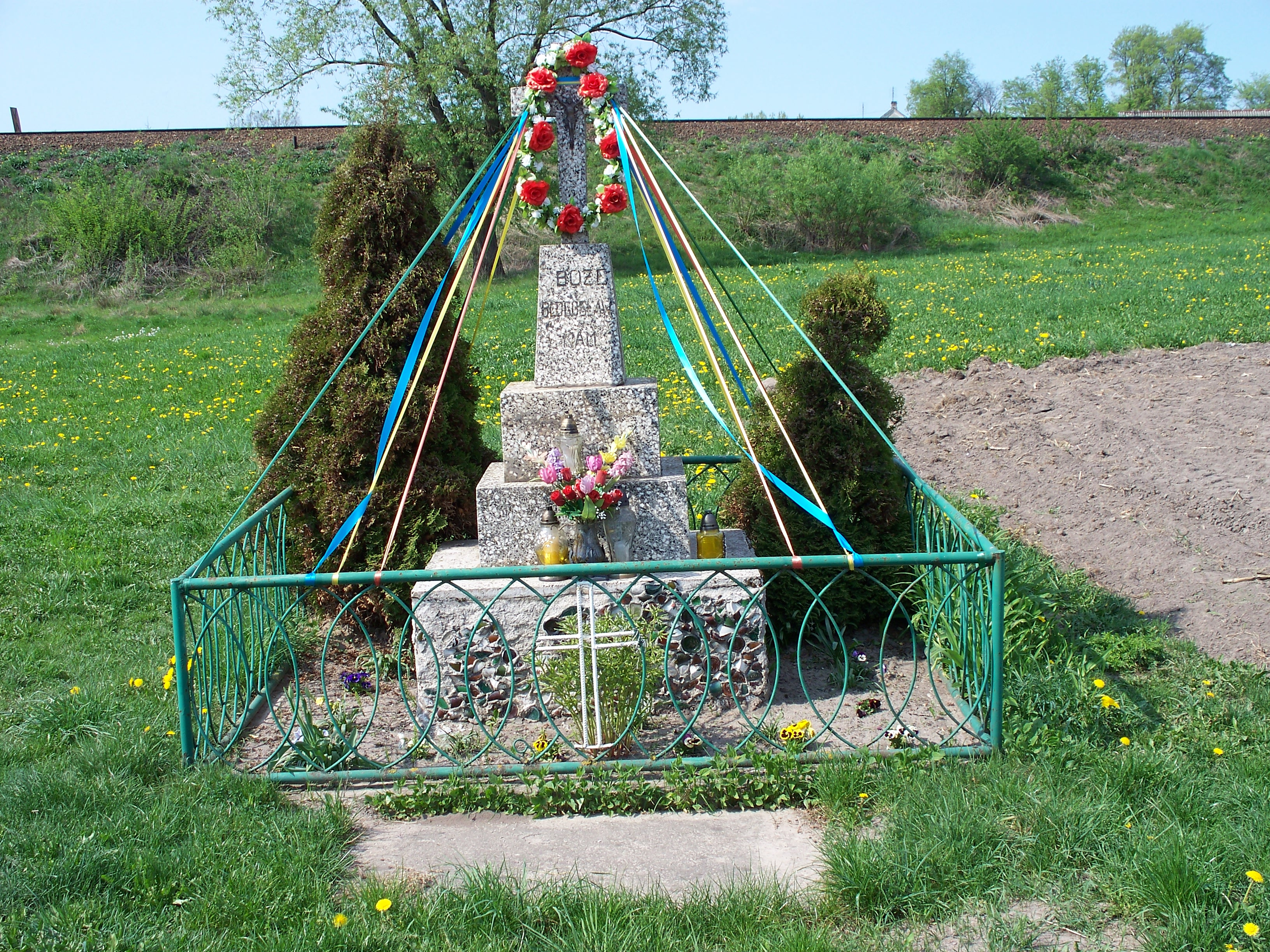 Przed powstaniem kolei w miejscu, w którym obecnie znajduje się krzyż biegła prosto droga. Ukazuje to m.in. mapa z 1807 roku.